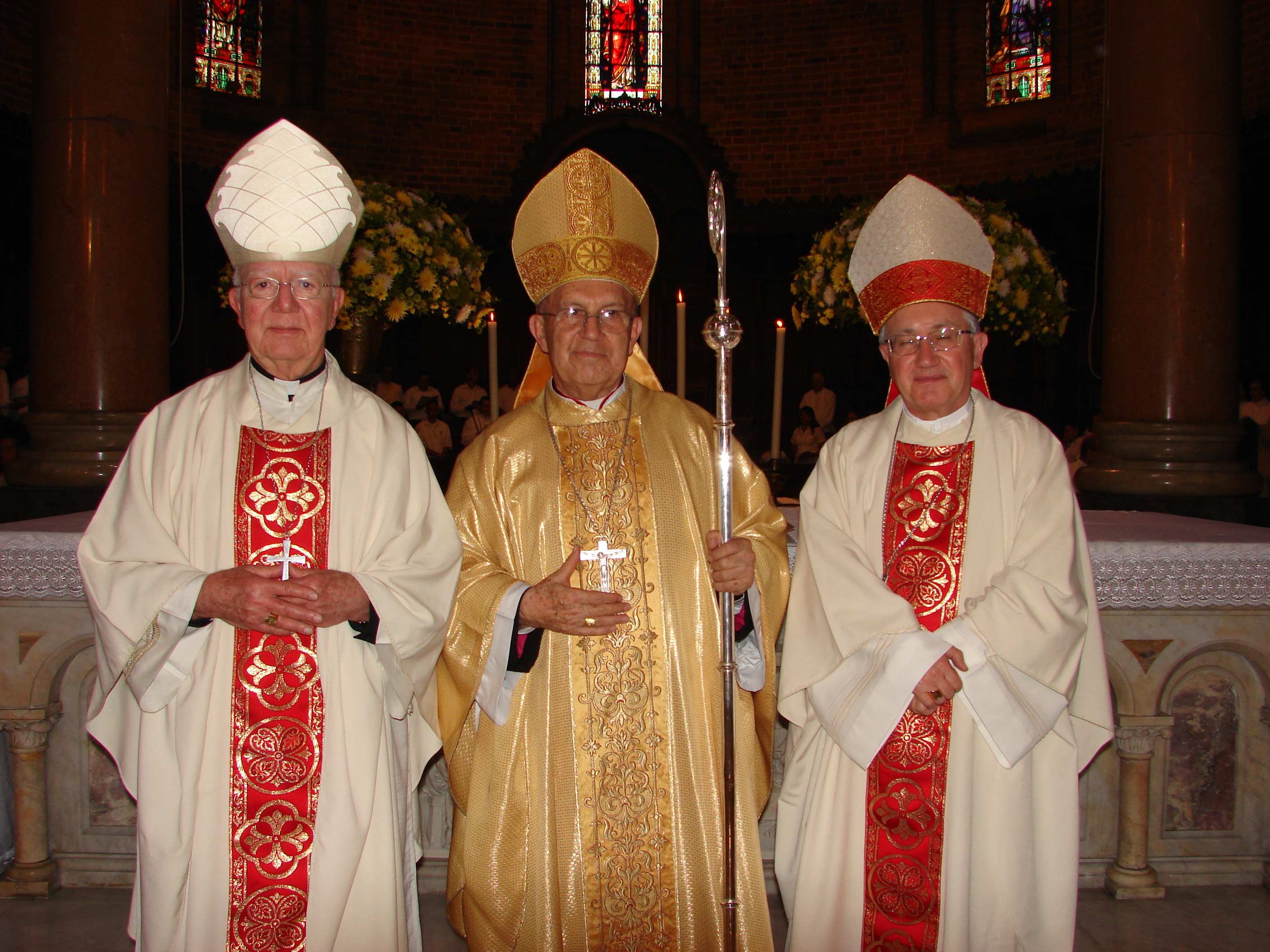 De izquierda a derecha: Aldo Cavalli, Nuncio Apostólico de Colombia; Alberto Giraldo Jaramillo, arzobispo emérito de Medellín; y Pedro Rubiano Sáenz, cardenal y arzobispo emérito de Bogotá. Colombia.